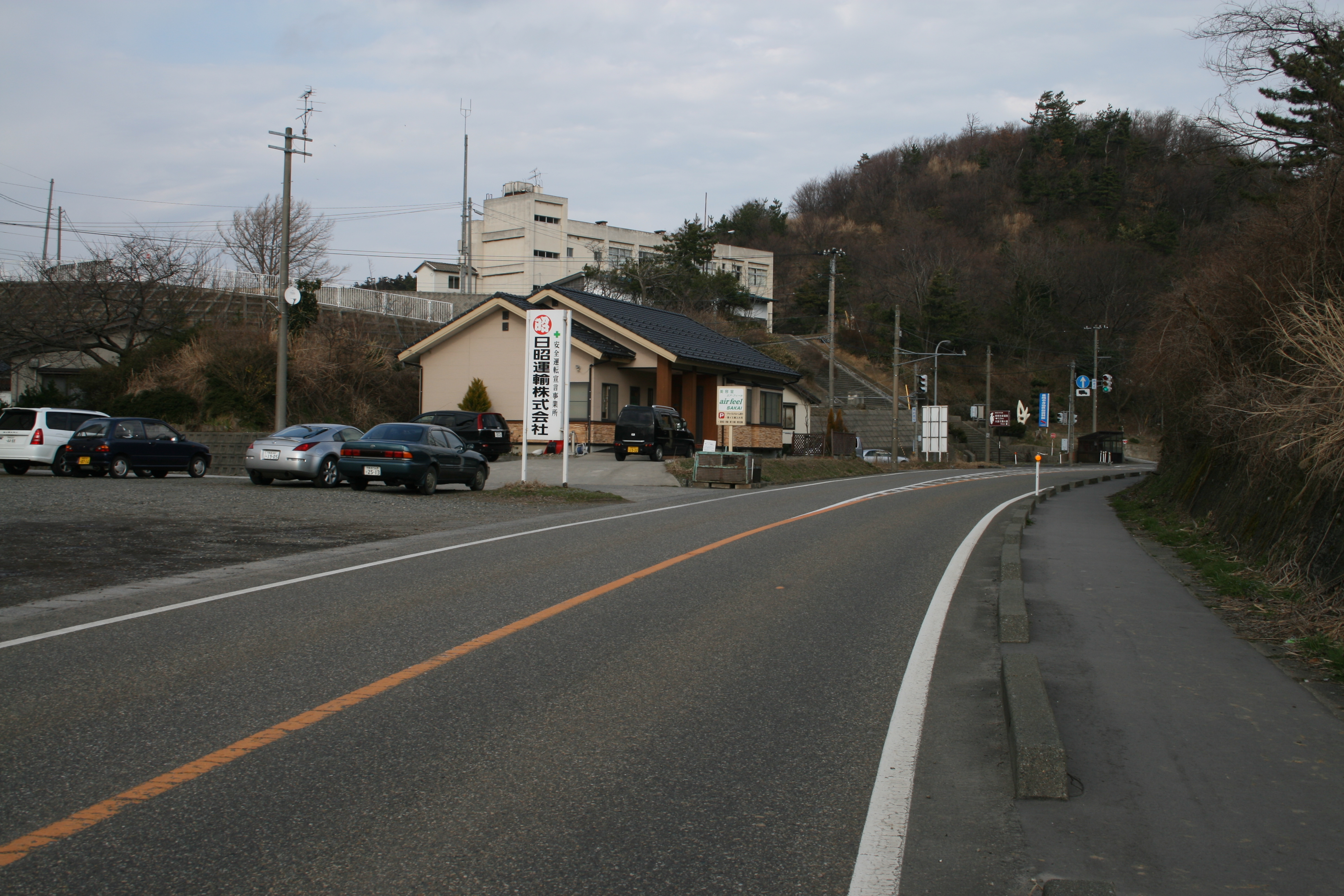 長岡鉄道寺泊新道駅跡。カーブする道路がほぼ廃線跡で、左の建物のある所に駅舎があった。